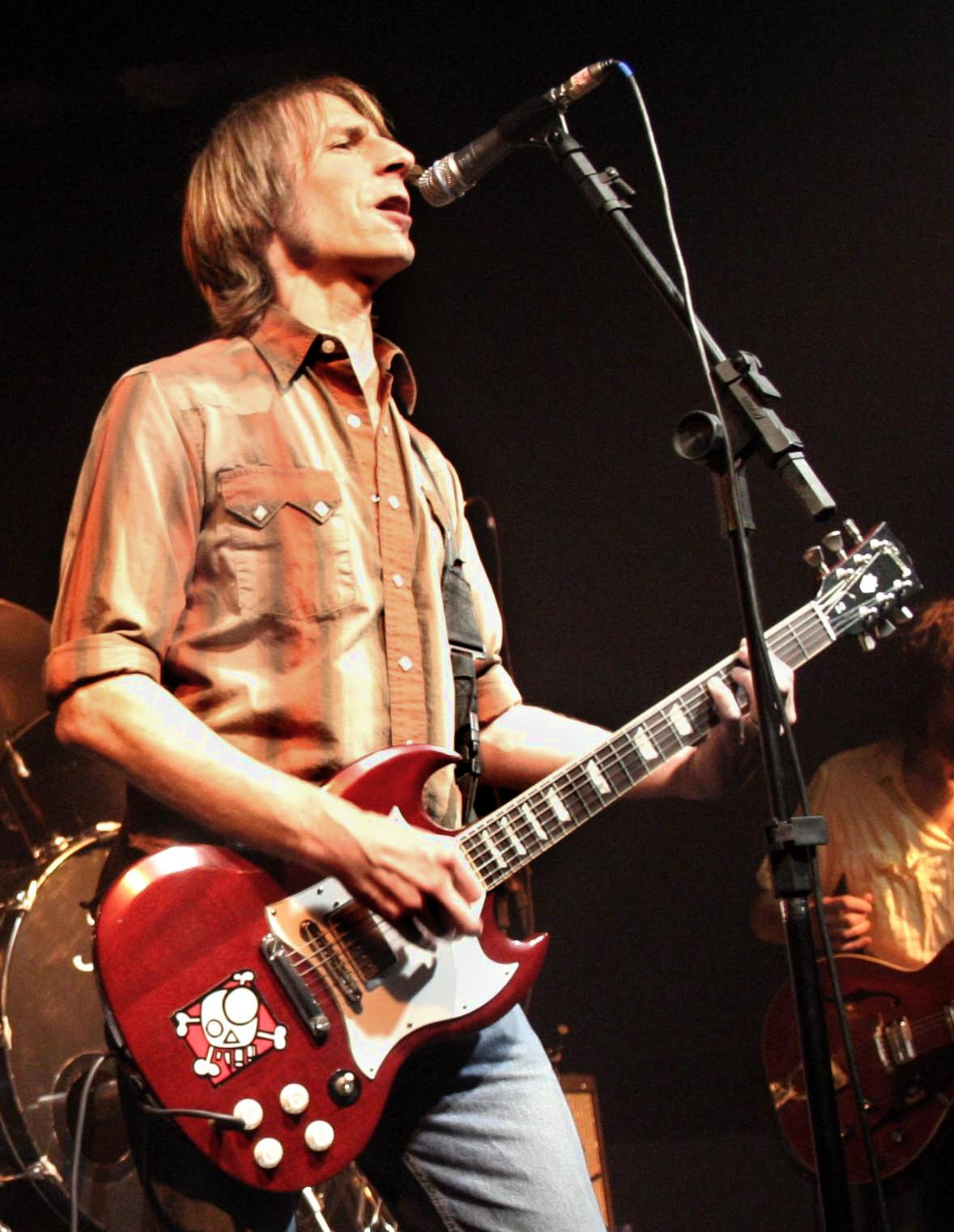 mudhoney